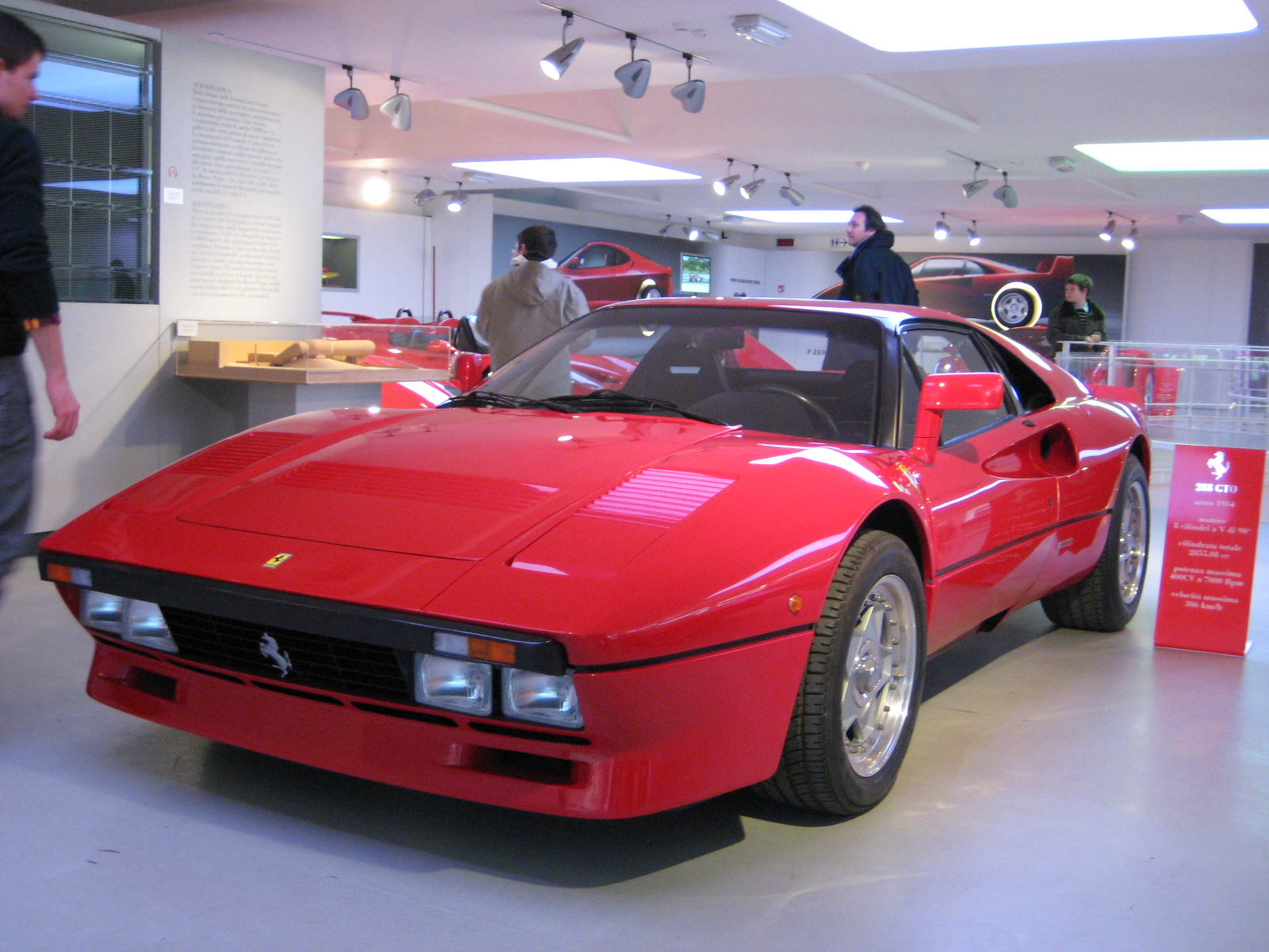 Ferrari 288 GTO at Galleria Ferrari, maranello